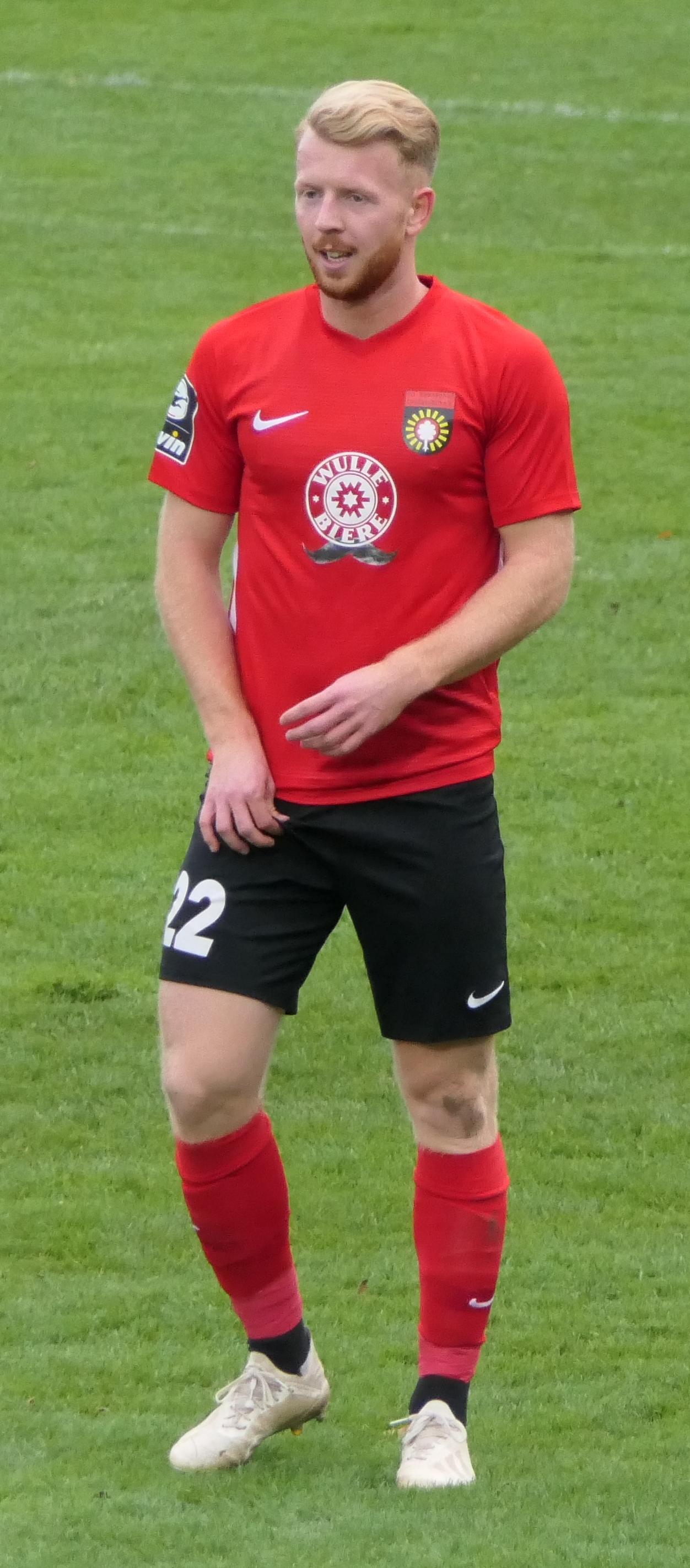 Der Fussballprofi Dominik Martinovic im Trikot der SG Sonnenhof Großaspach beim Heimspiel gegen Eintracht Braunschweig am 27.10.2019.